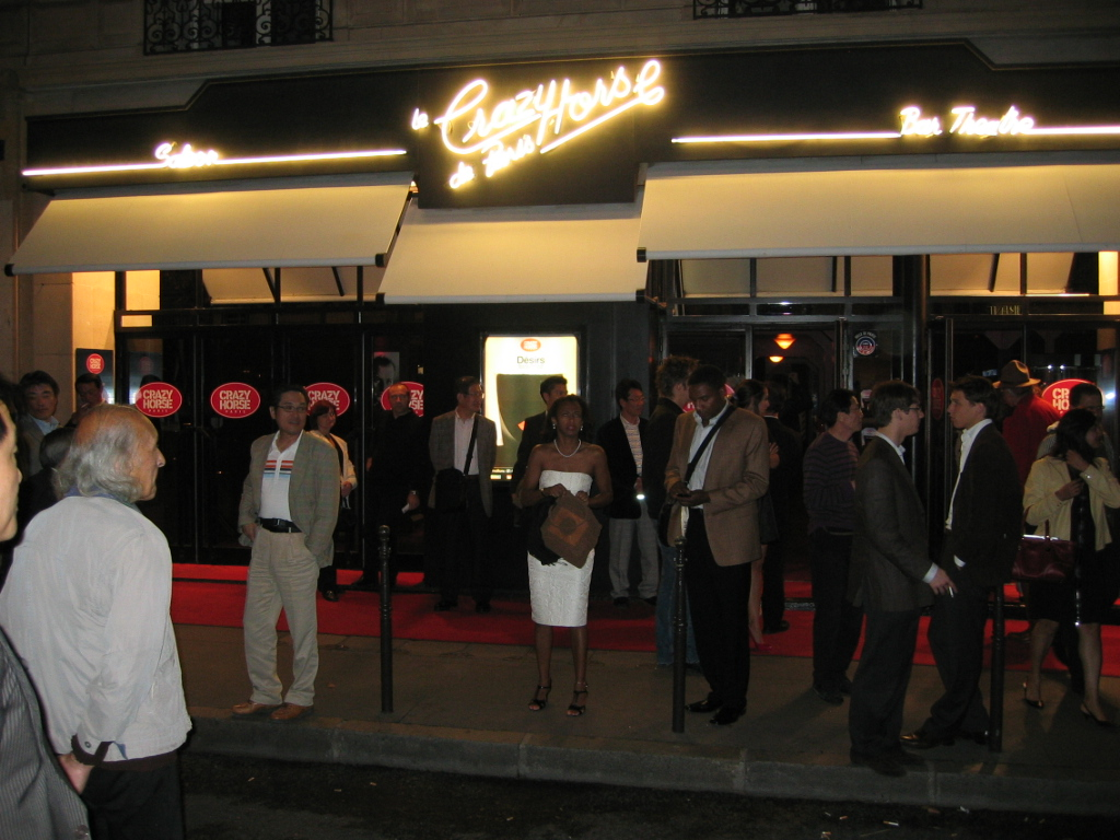 Cabaret Crazy-Horse Paris